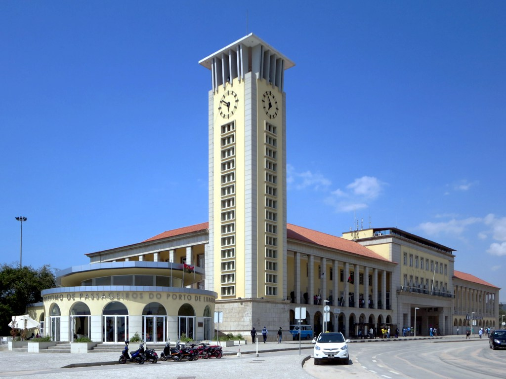 The Terminal Marítimo de Passageiros stands next to the port entrance at Luanda, Angola.